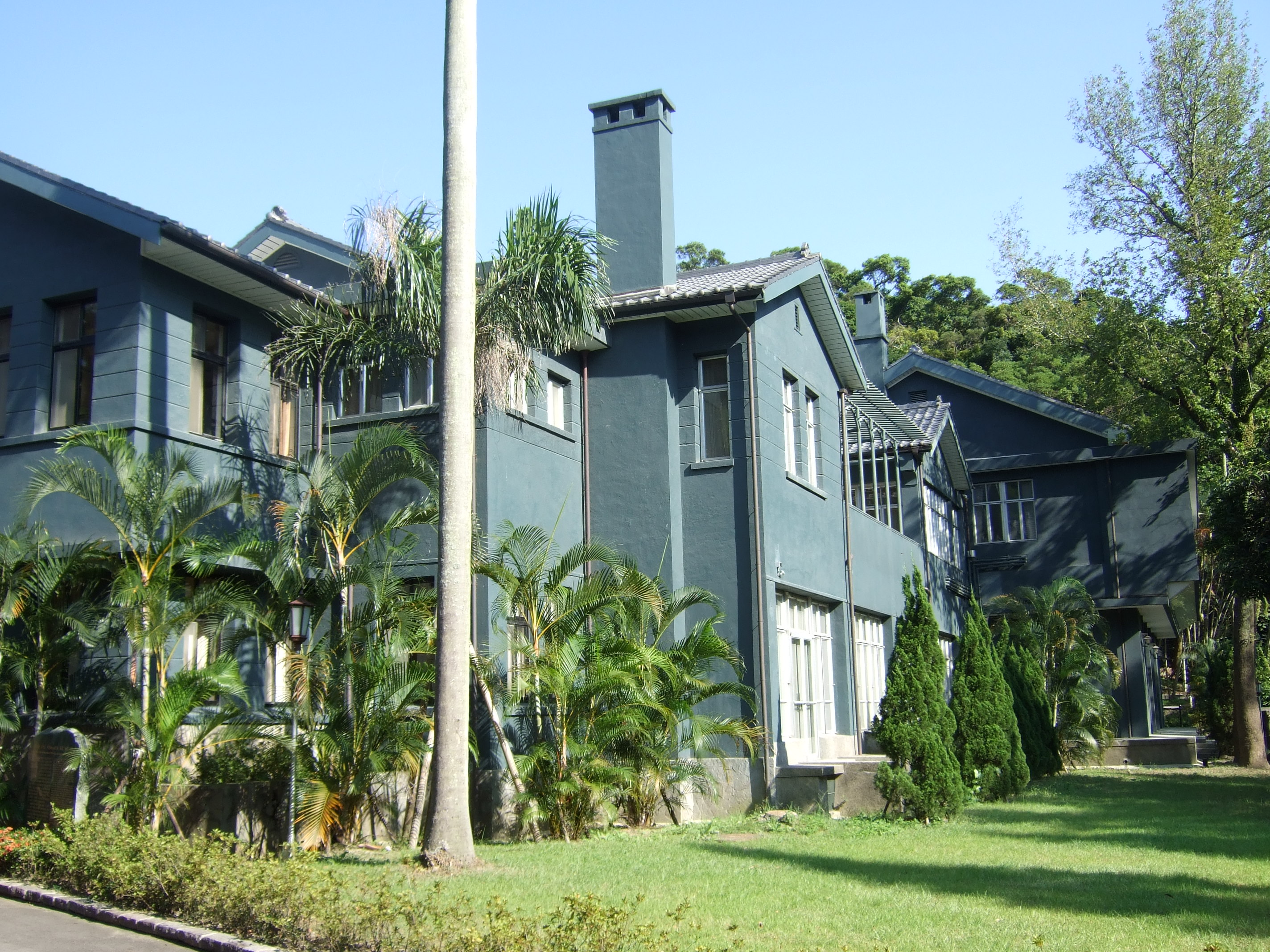 士林官邸主屋外景。